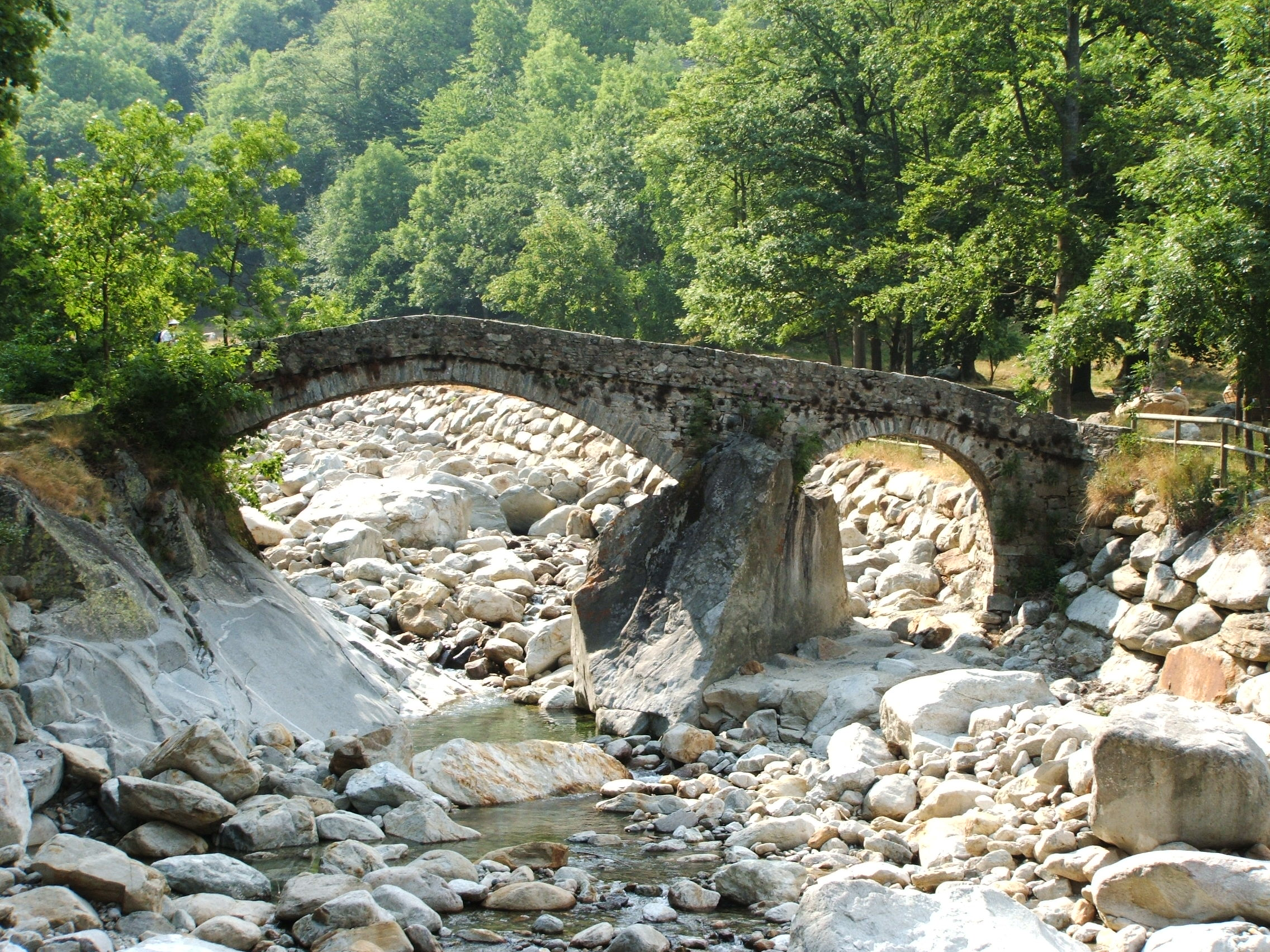 Piedicavallo, comune della Valle Cervo, provincia di Biella (Piemonte, Italia)